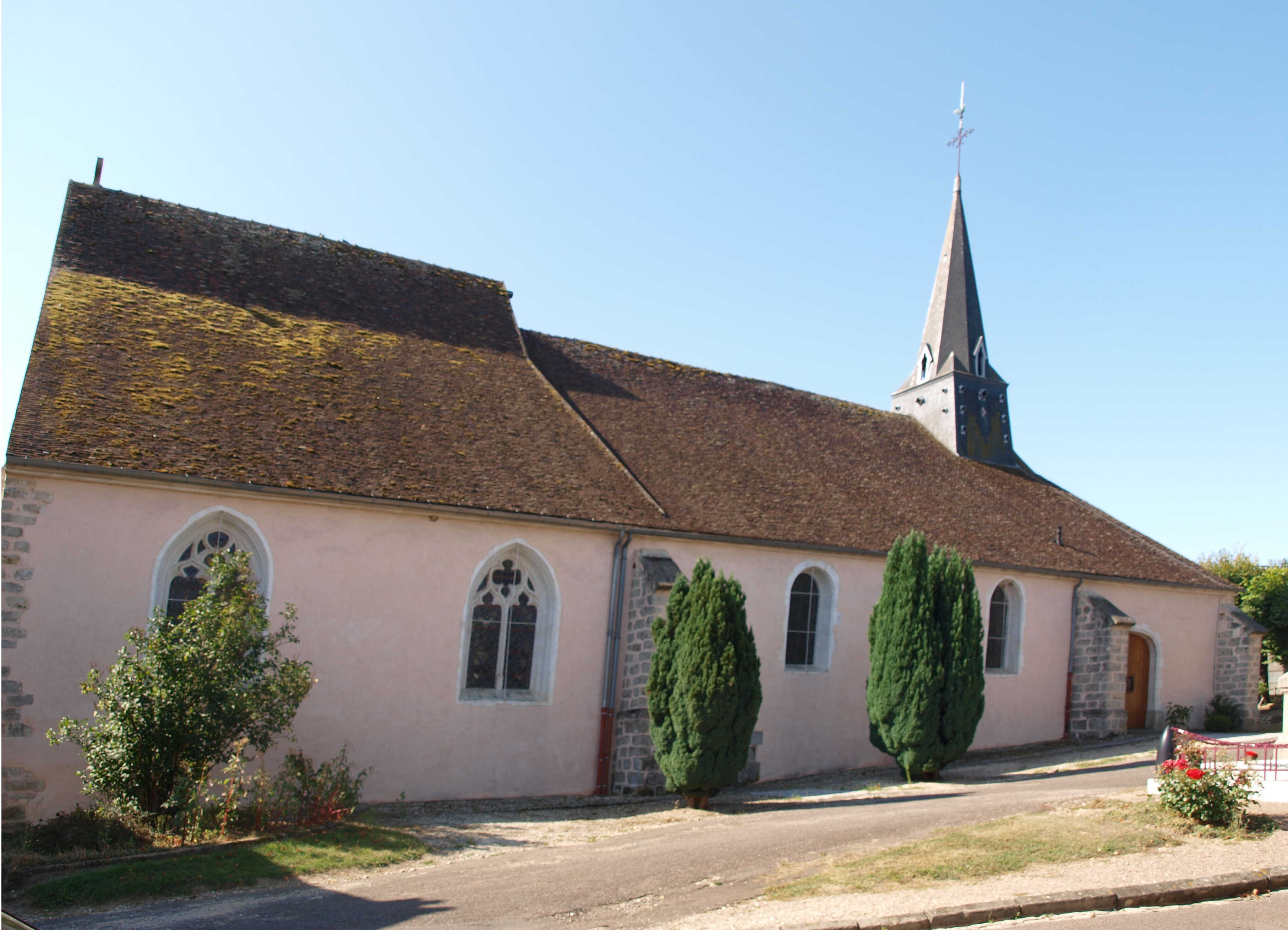 La Celle-Saint-Cyr (Yonne) ; l'église